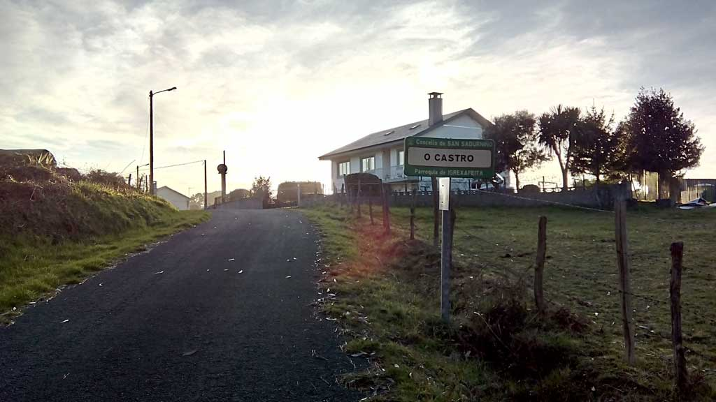 Vista do Castro, Igrexafeita, San Sadurniño.